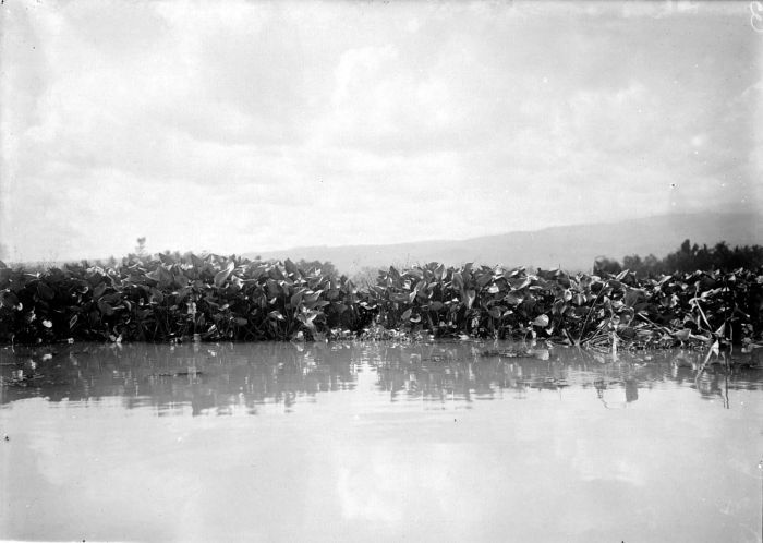 Negatief. Eichhornia-begroeiing van moeras Rawa Pening bij Ambarawa, Midden-Java